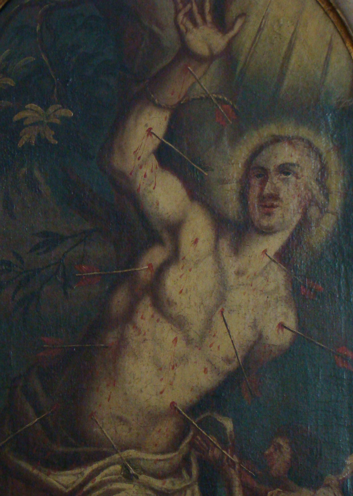 Kath. Kirche St. Alban in Heilbronn-Kirchhausen, Sebastiansbild im Chor, Detail